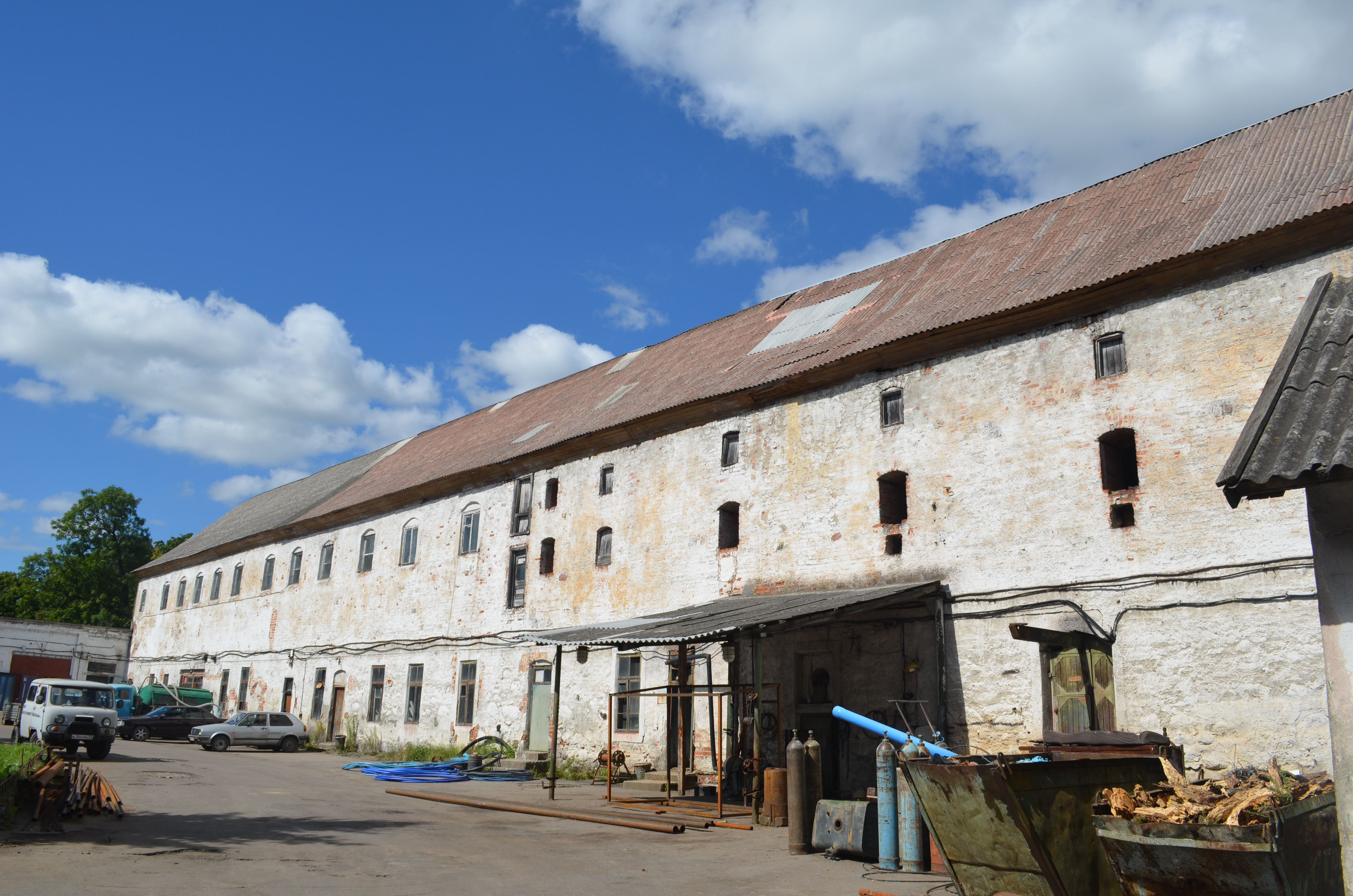 Замок бишопа (Нойхаузен) (Калиниградская область, Гурьевск, Заречная улица, 2)